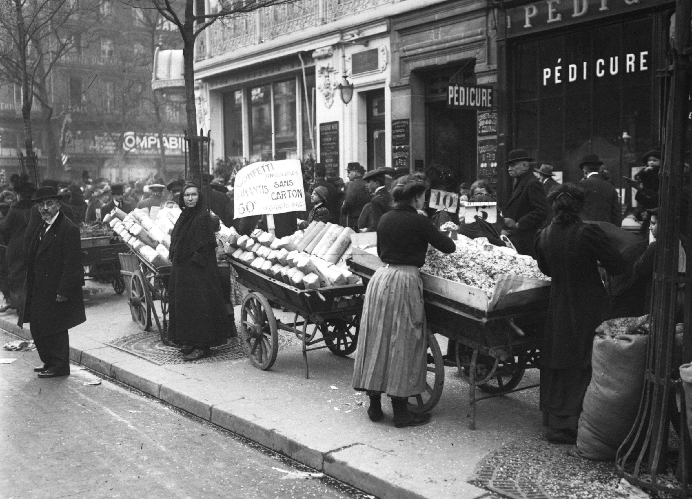 Marchands de confettis à Paris en 1914.